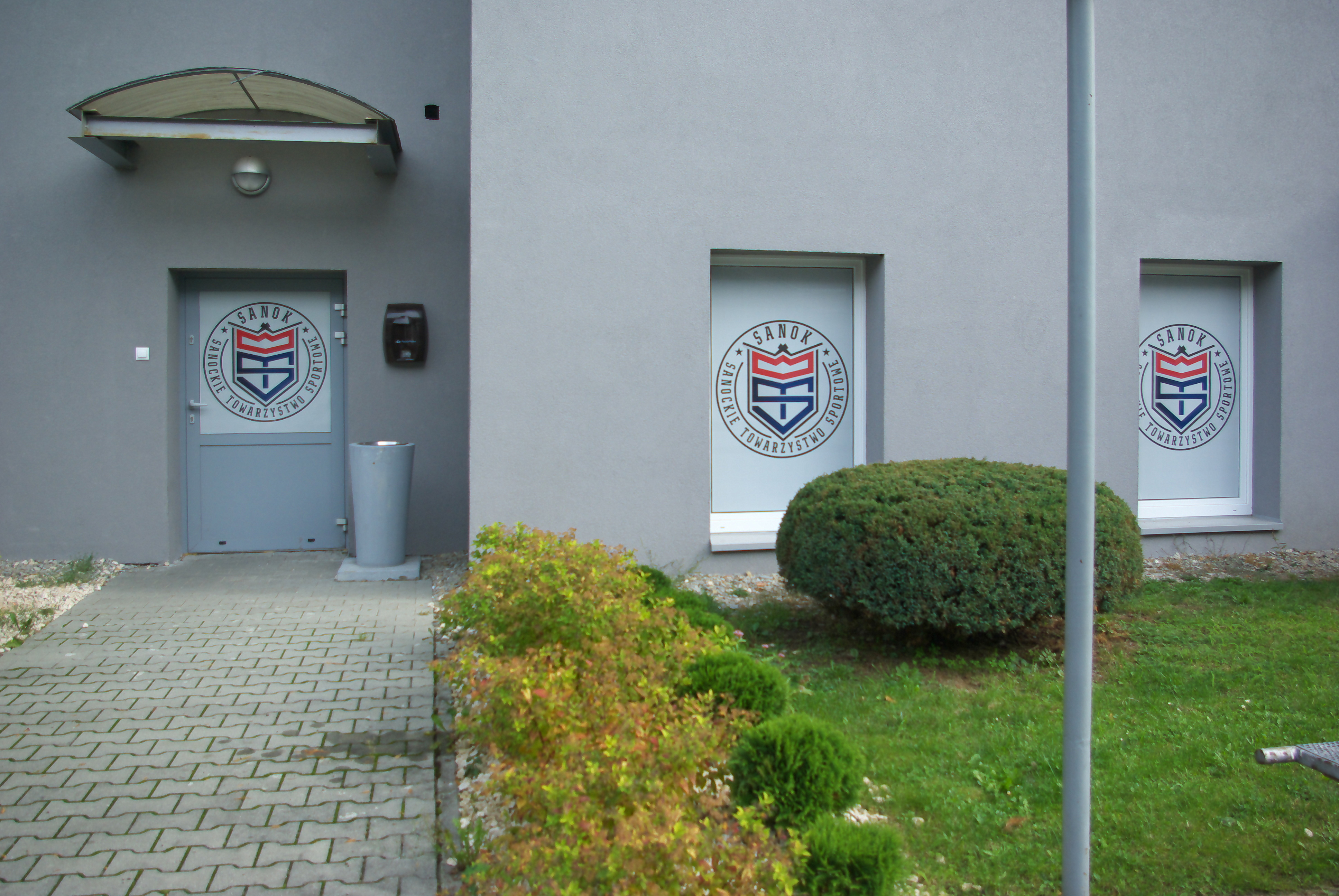 Siedziba STS S. A. w Sanoku, ul. Królowej Bony 4.